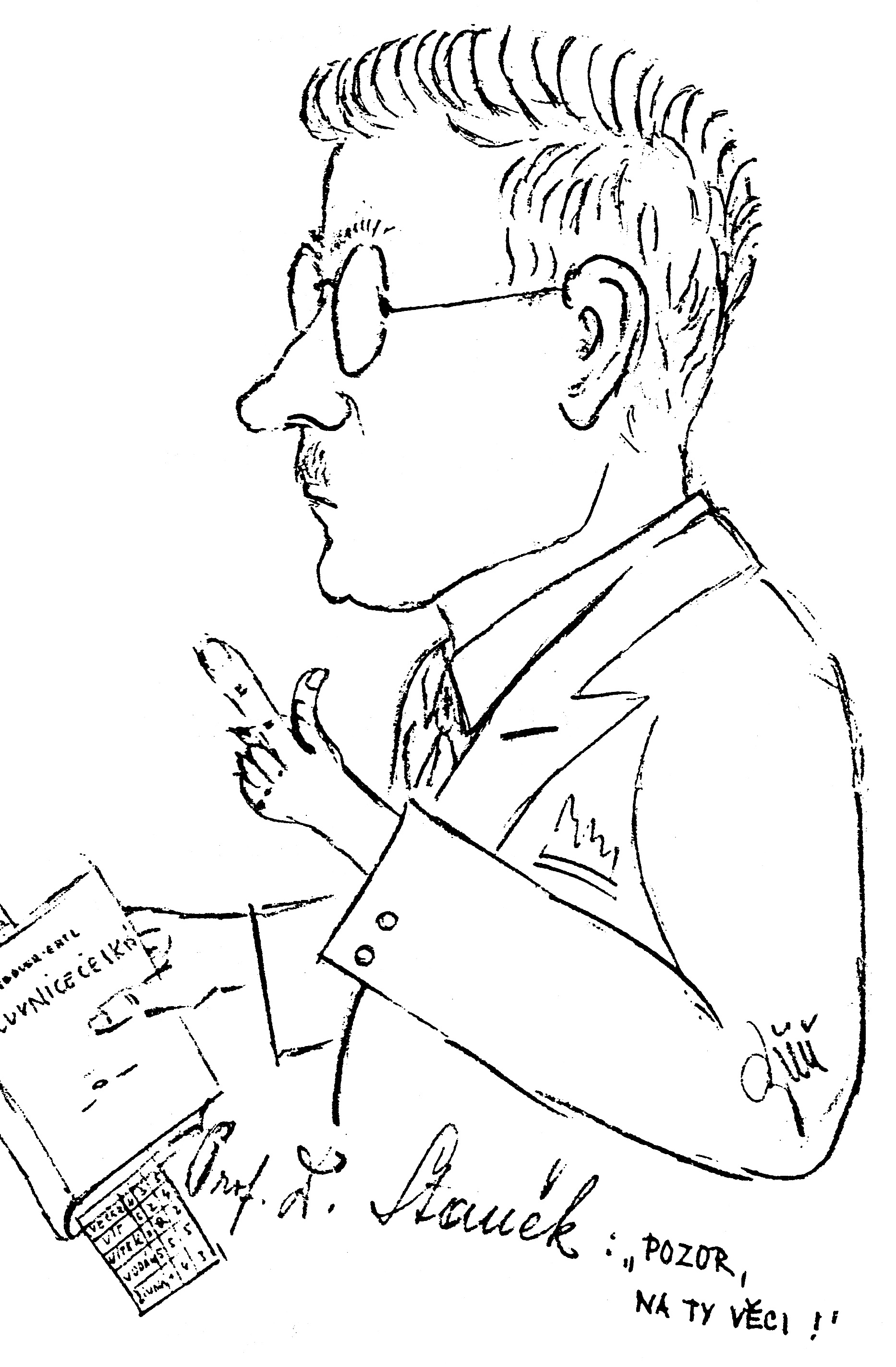 Roku 1933 vytvořil žák 2. ročníku Učitelského ústavu v Brně Oldřich Břeň karikaturu dr. Josefa Staňka